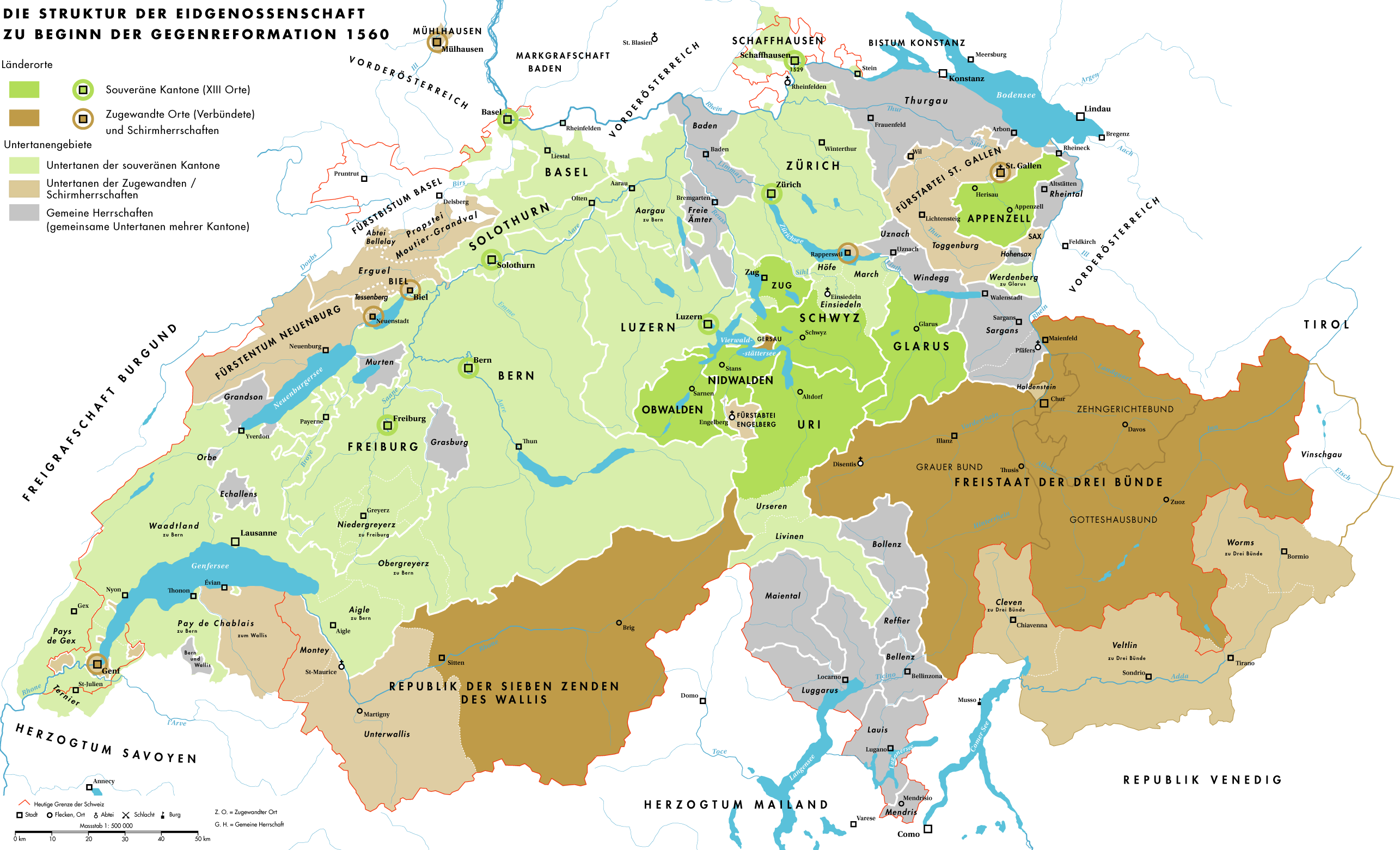 Die Struktur der schweizerischen Eidgenossenschaft zu Beginn der Gegenreformation 1560